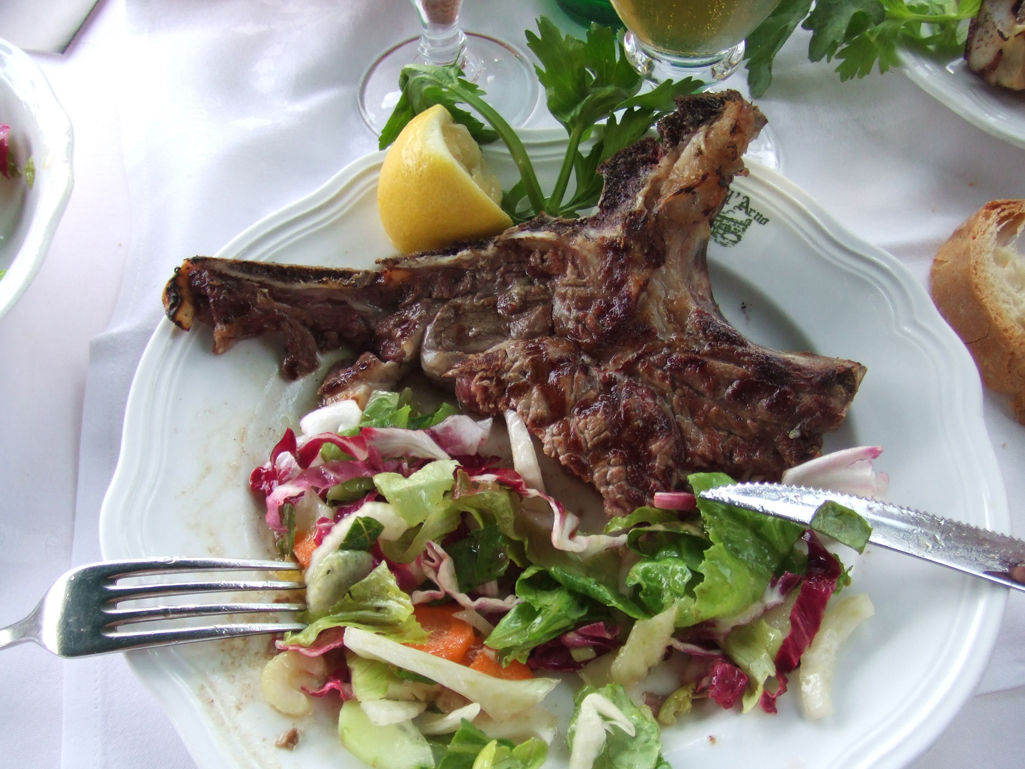 Bistecca alla fiorentina